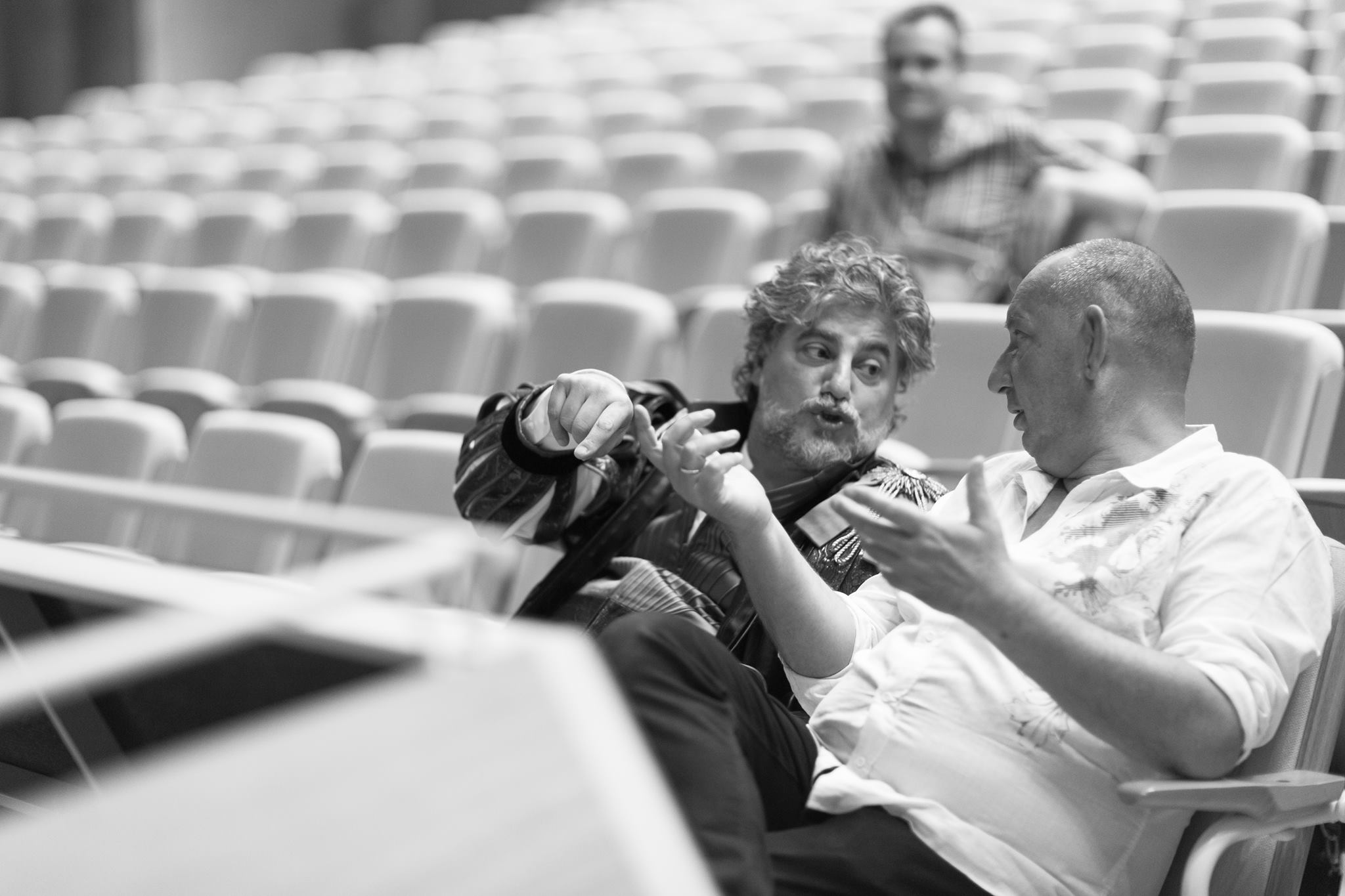 Manfred Schweigkofler at work